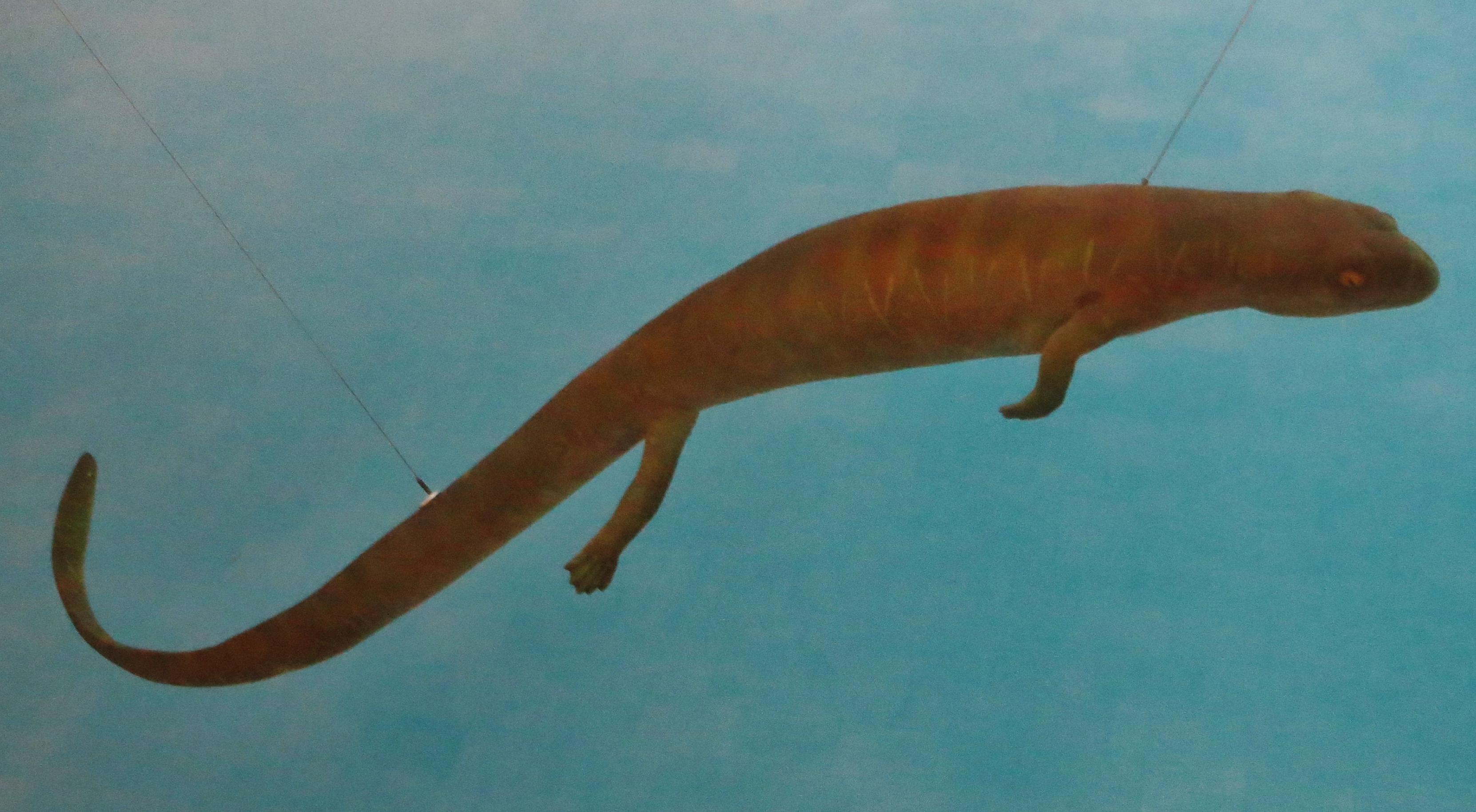 Model of Palaeopleurosaurus - Took the picture at Museum am Lowentor, Stuttgart